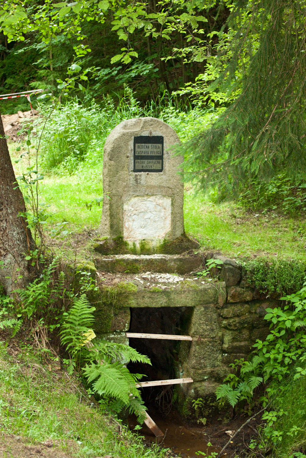 Jiná těžařská stavba - odvodňovací dědičná štola G. Pfluga (Údolí I), u silnice z Horního Slavkova na Loket, Údolí I